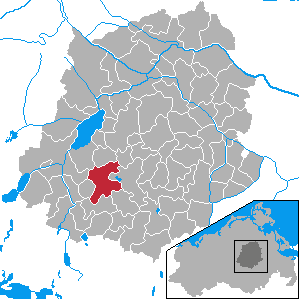 Stavenhagen, Landkreis Demmin, Mecklenburg-Vorpommern